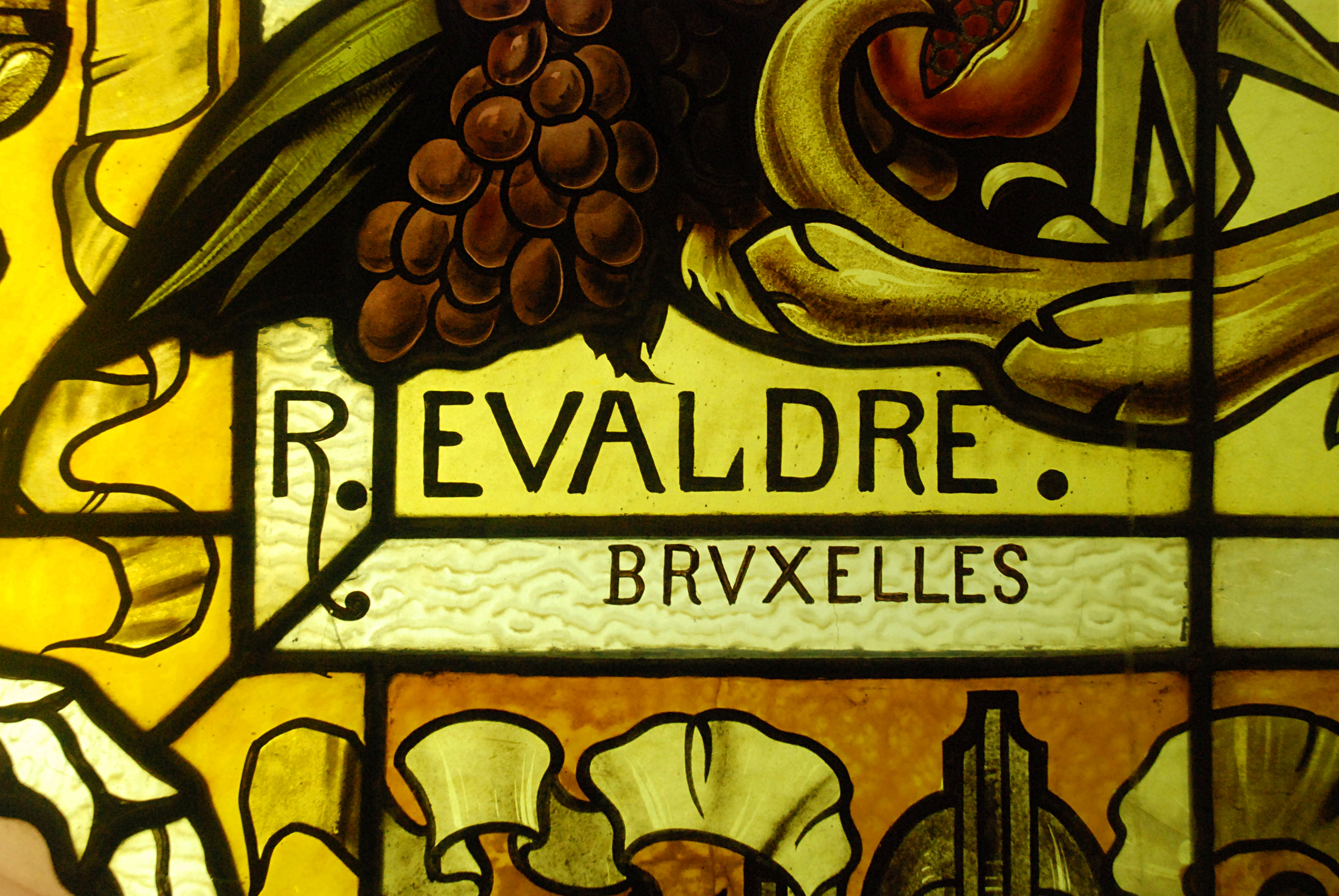 Signature de Raphaël Évaldre sur le vitrail situé au niveau du quai de la Gare du Luxembourg.